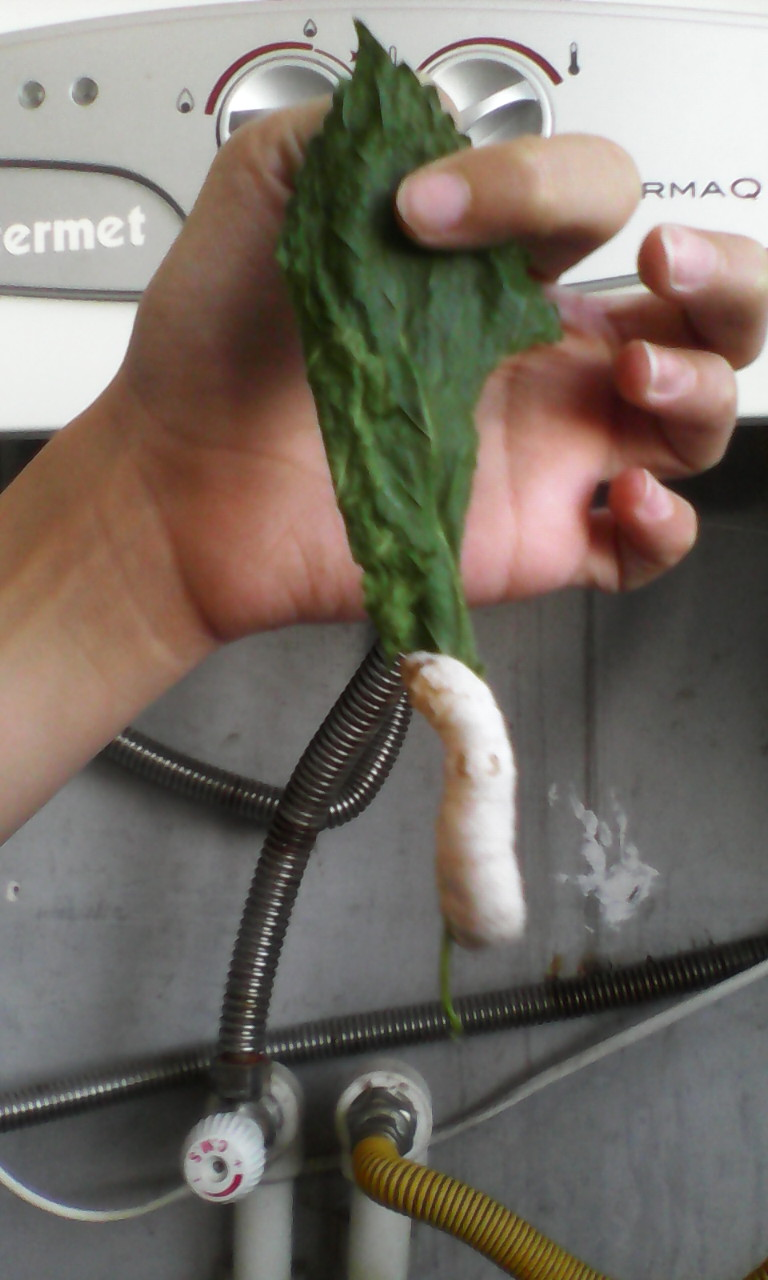 İpekqurdu yarpaqla beslenir o çox möcüzevi heşaratdır men ona evde baxıram ve onu keşf edirem ALLAHIN yaratdıqlarına Şükr etmeliyik